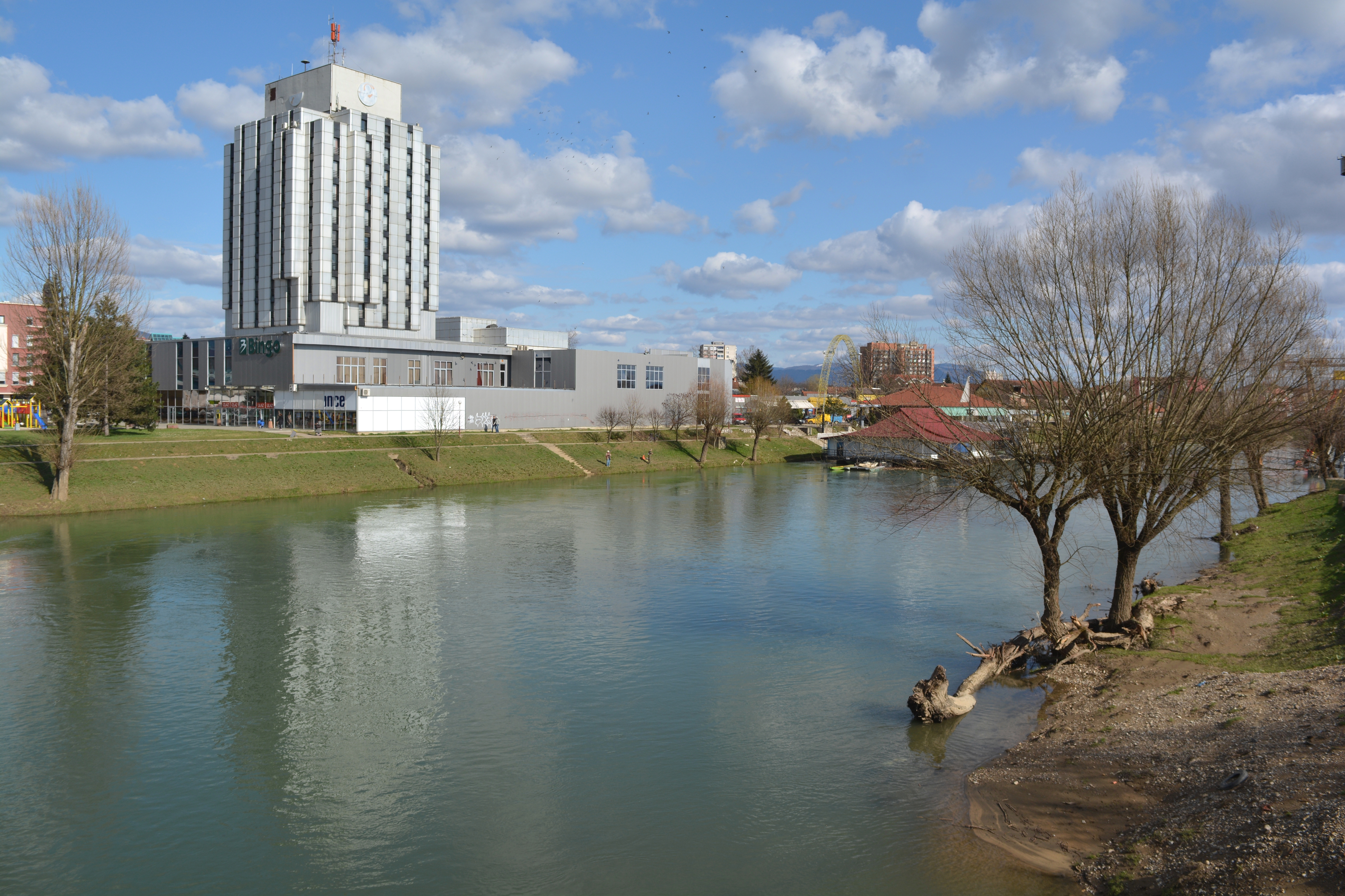 ((Tos17rs/PPP039))